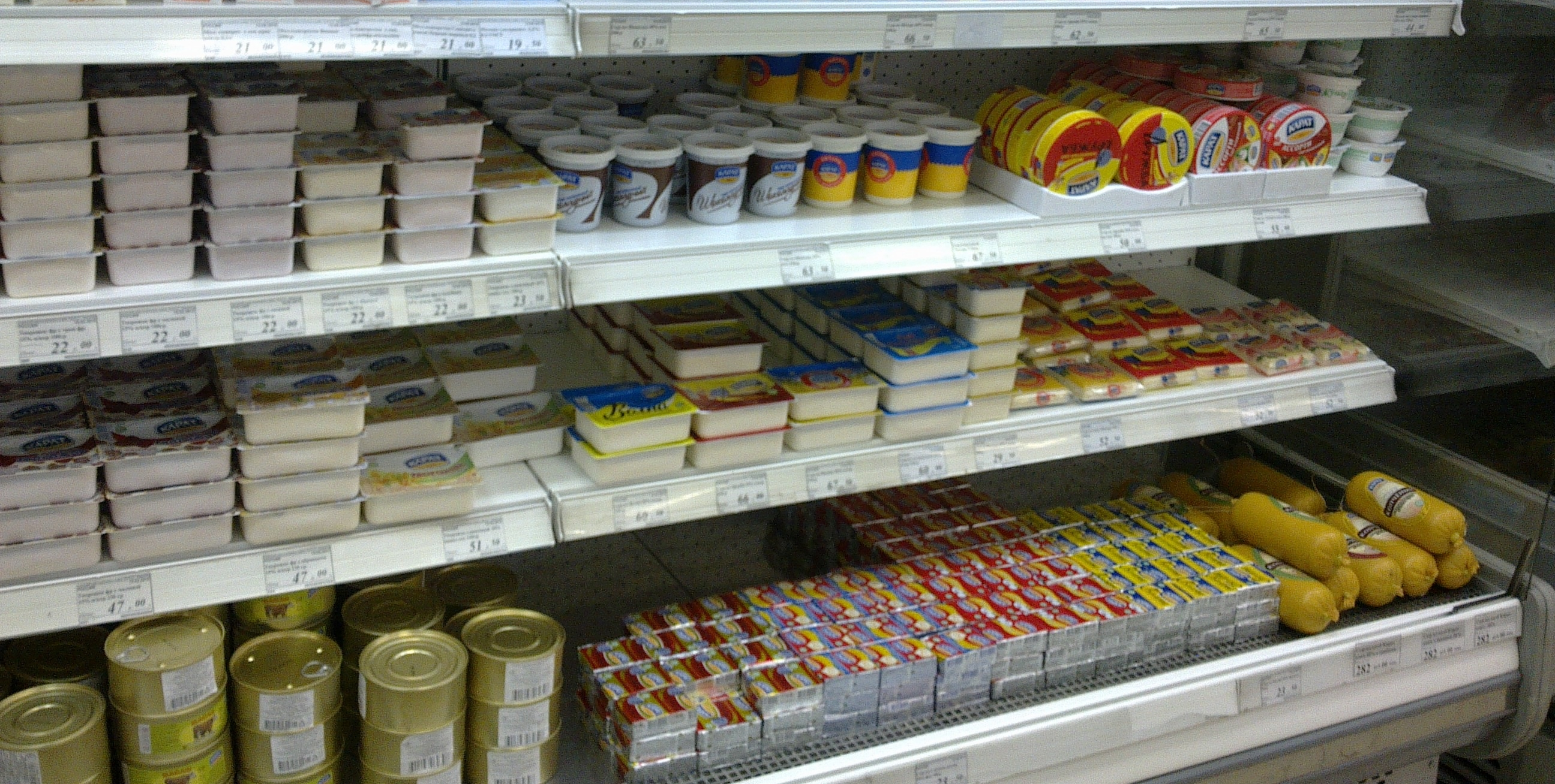 Продукция завода «Карат» в продуктовом магазине